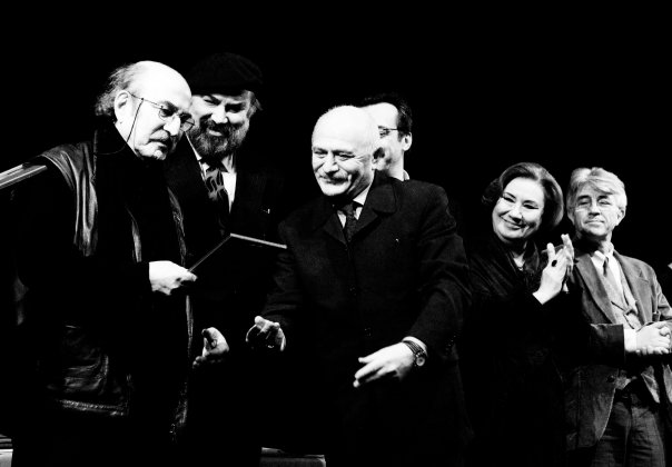 Nazım Hikmet Okuma Tiyatrosu 2010 Volkan Doğar'ın çektiği resim.